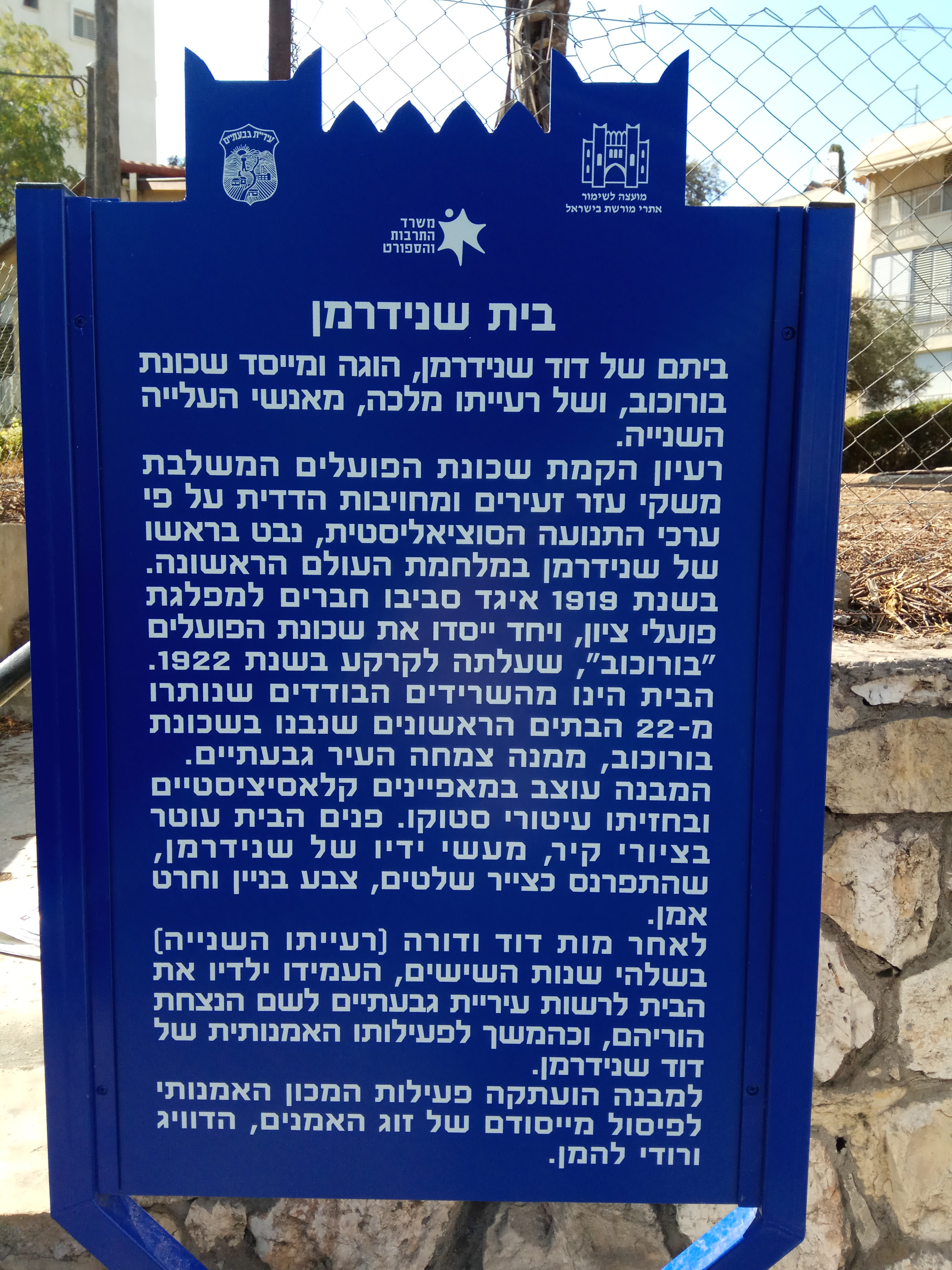 שלט בכניסה לבית שניידרמן בשכונת בורוכוב